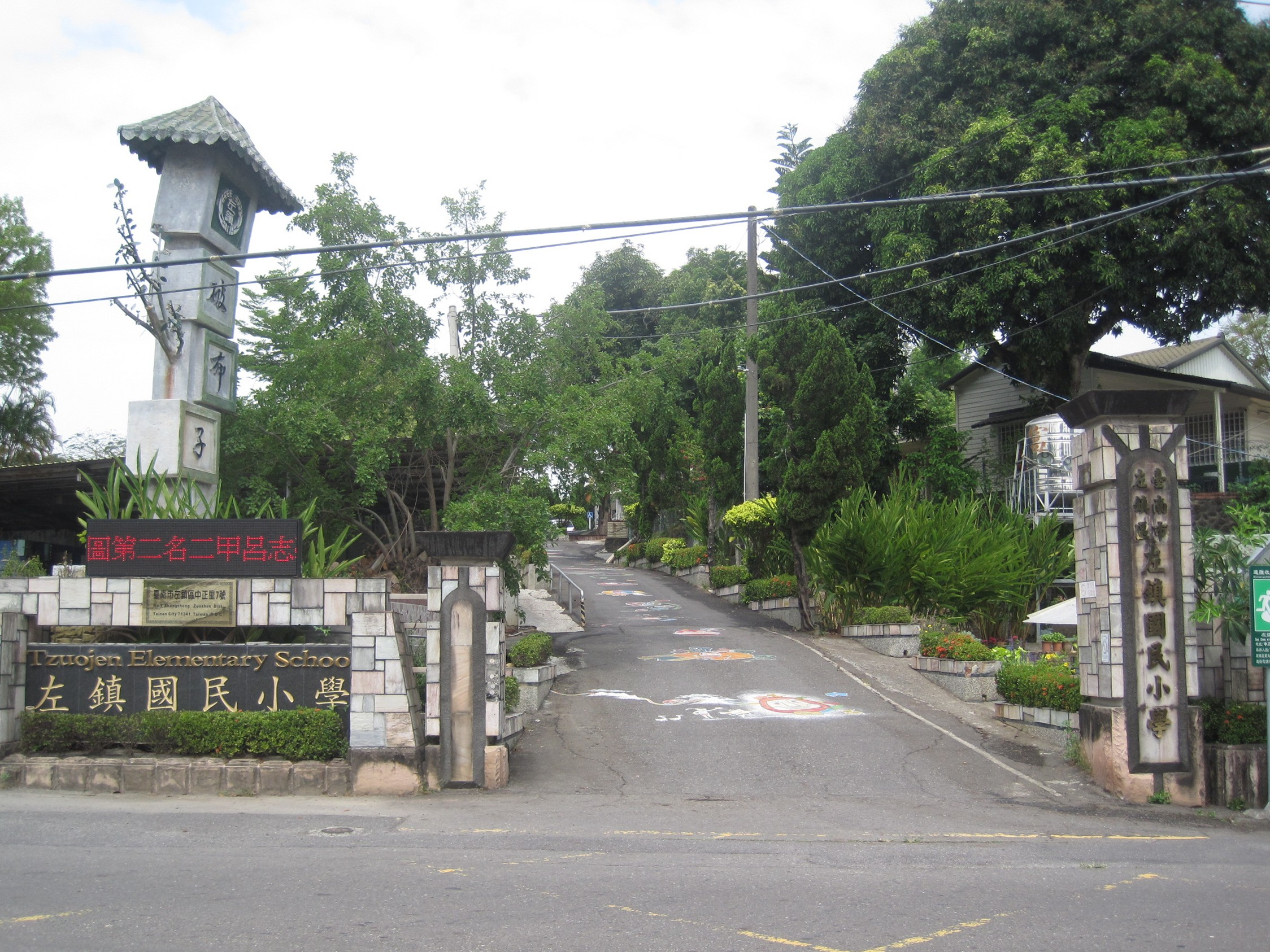 左鎮國小校門